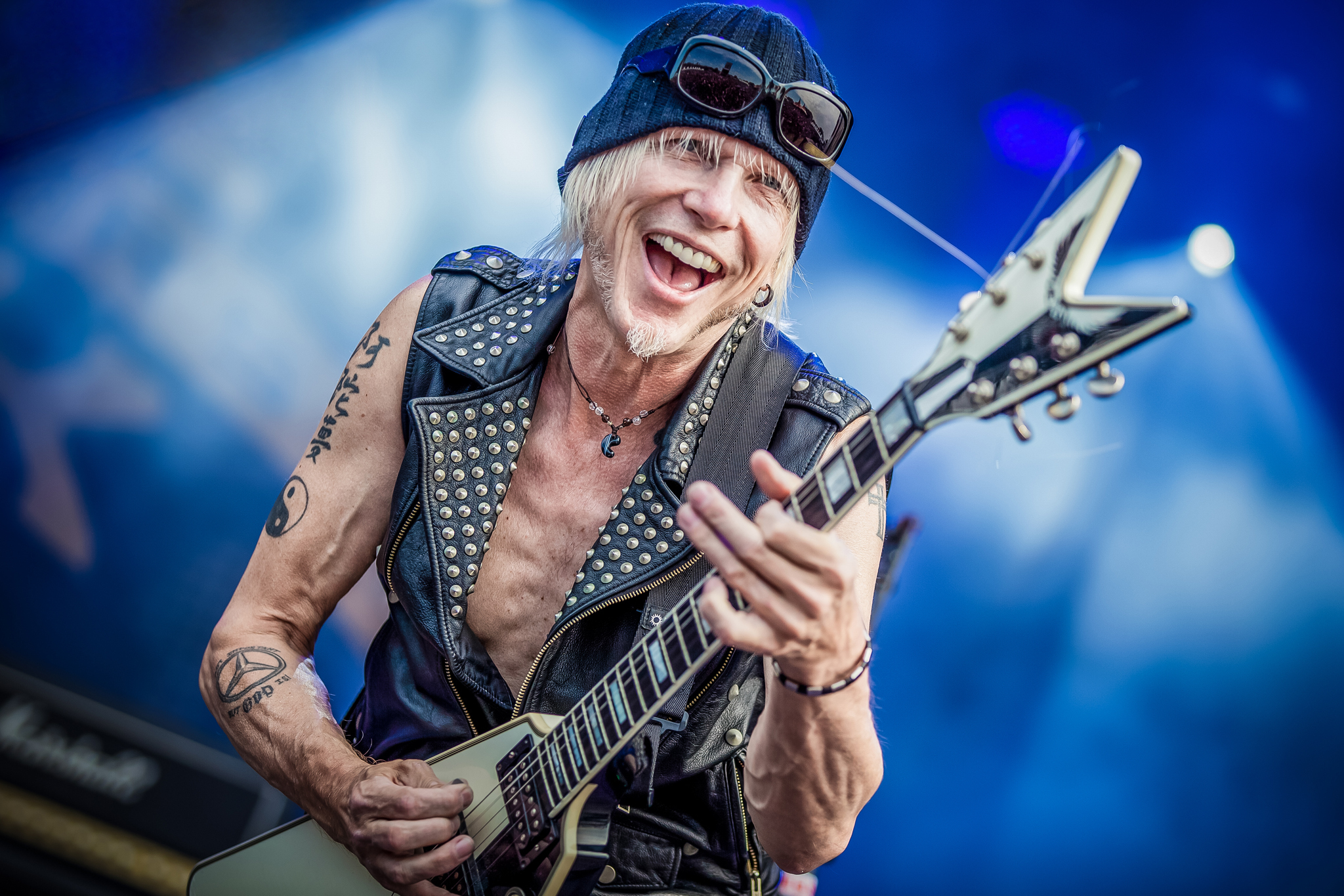 Michael Schenker tijdens een optreden in 2015